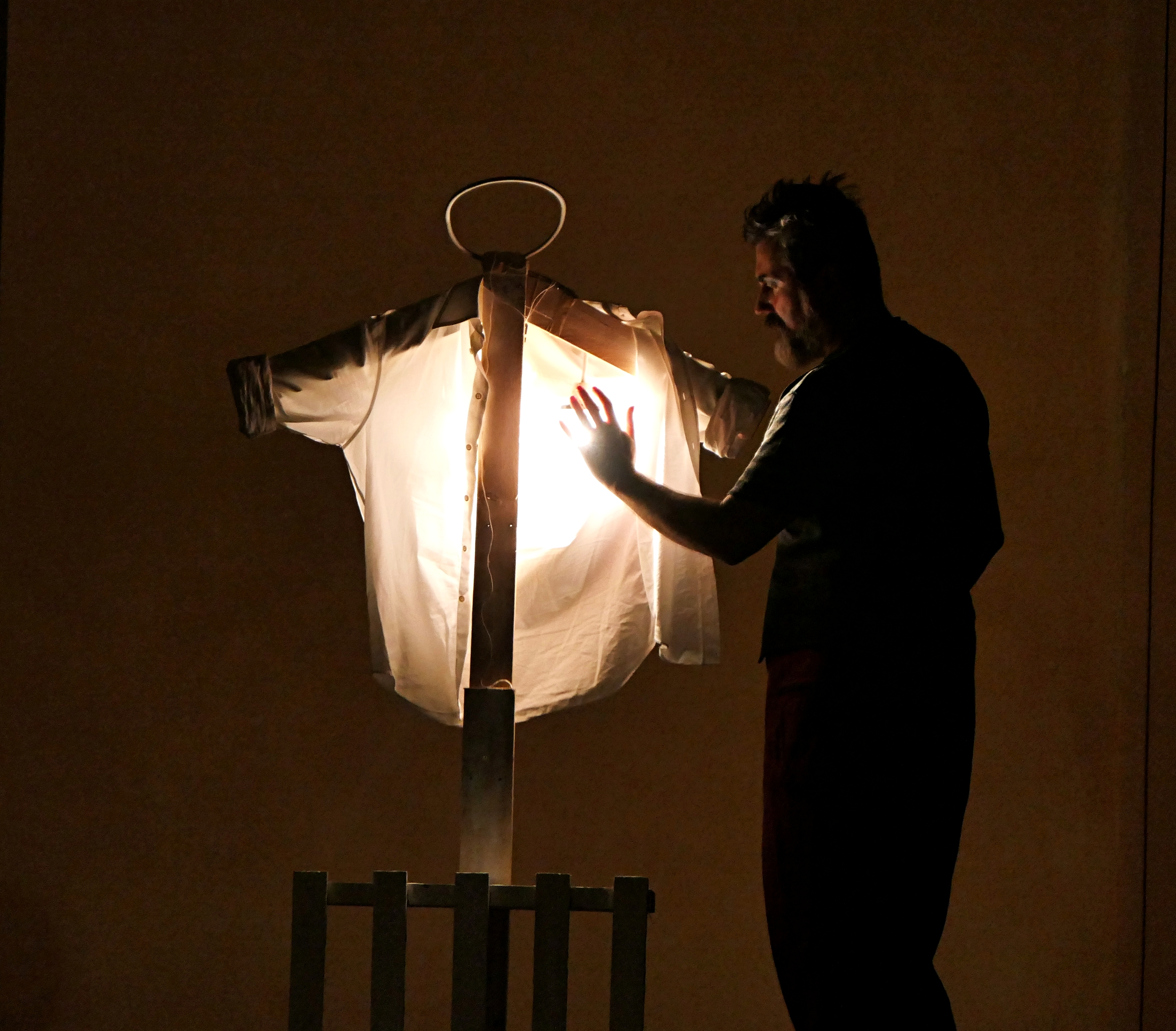 Andrea Bruni in scena ne "Il fantasierrimo A", primo spettacolo messo in scena dopo il Lockdown